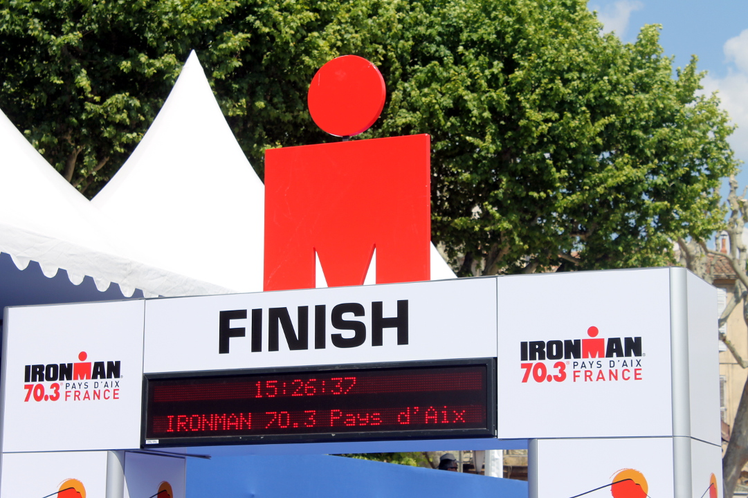 Portique avec logo de IM 70.3 Pays d'Aix, France